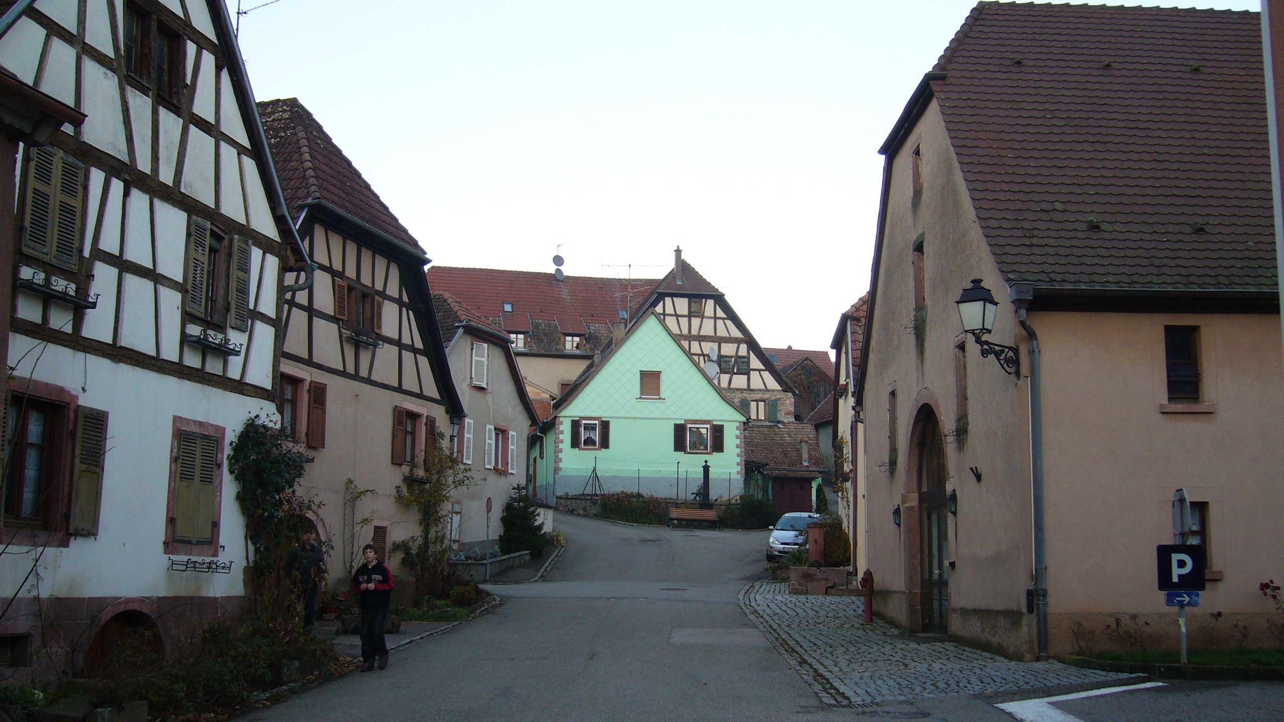 Une rue de Triembach-au-Val